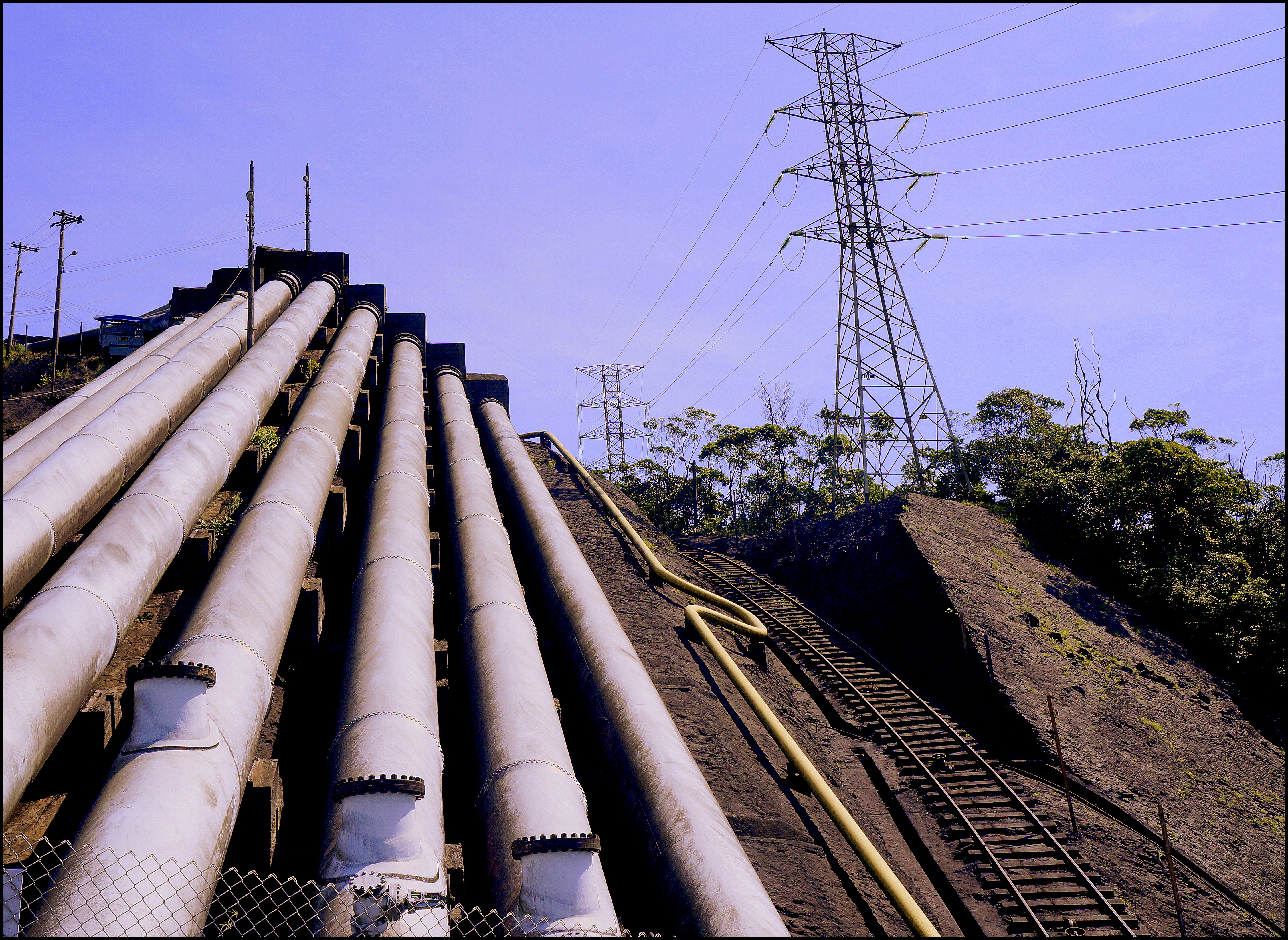 Usina Henry Borden - tubulações que conduzem a água do planalto para as turbinas